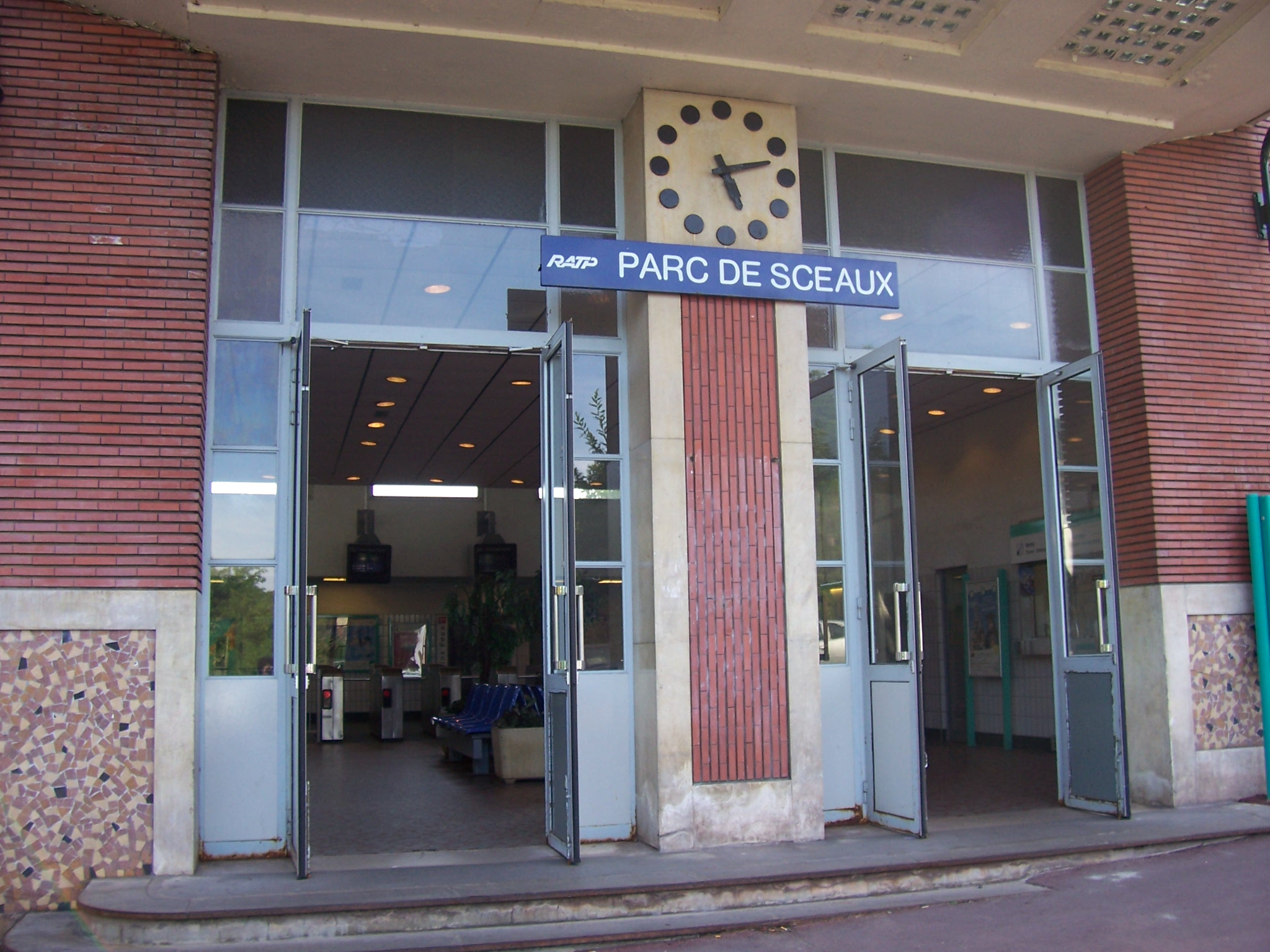 Gare de RER Parc de Sceaux - Antony Photo Mica 09/2006